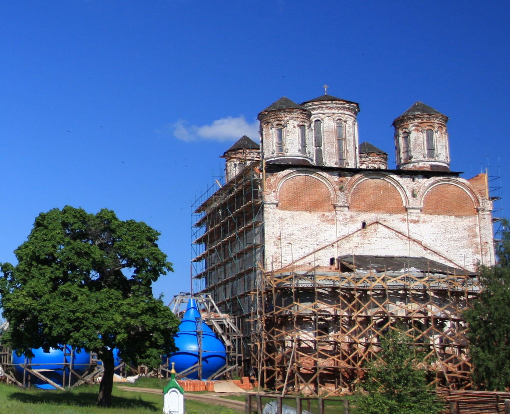 Успенский собор Фролищевой пустыни.